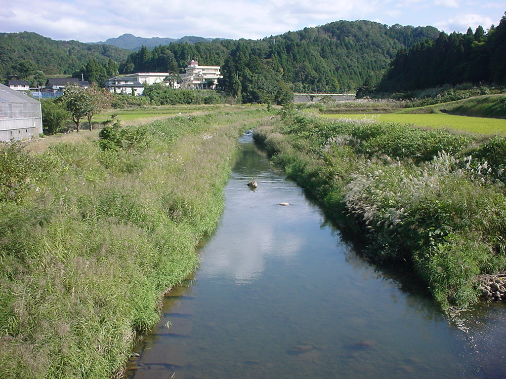 Shiraiwa River in Toyama, Japan. ja: 白岩川（富山県中新川郡立山町下白岩 下白岩橋（しもしらいわはし）より上流方向撮影）